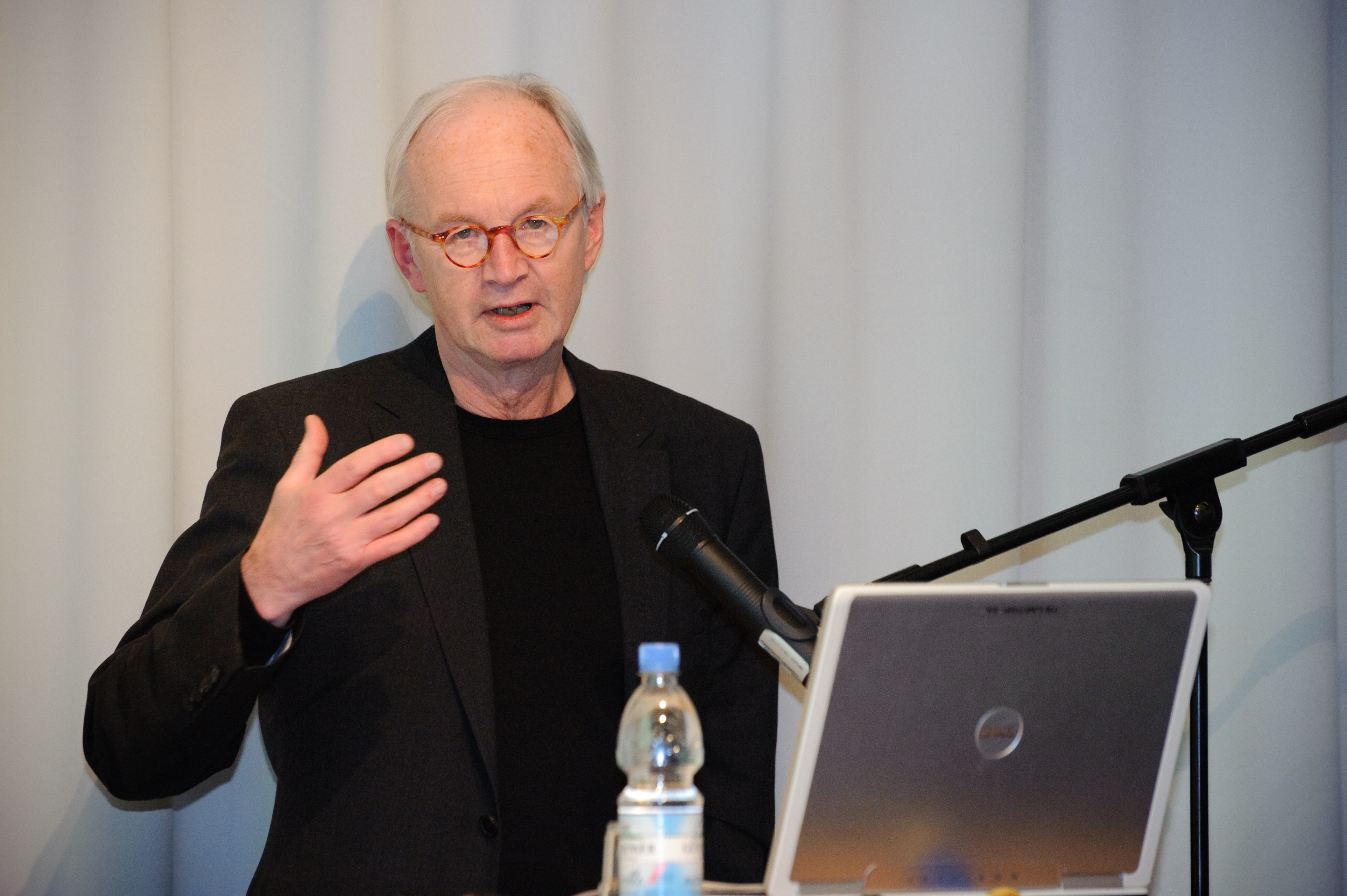 Buchvorstellung Deutsche Zustände - Folge 8 Foto: Stephan Röhl